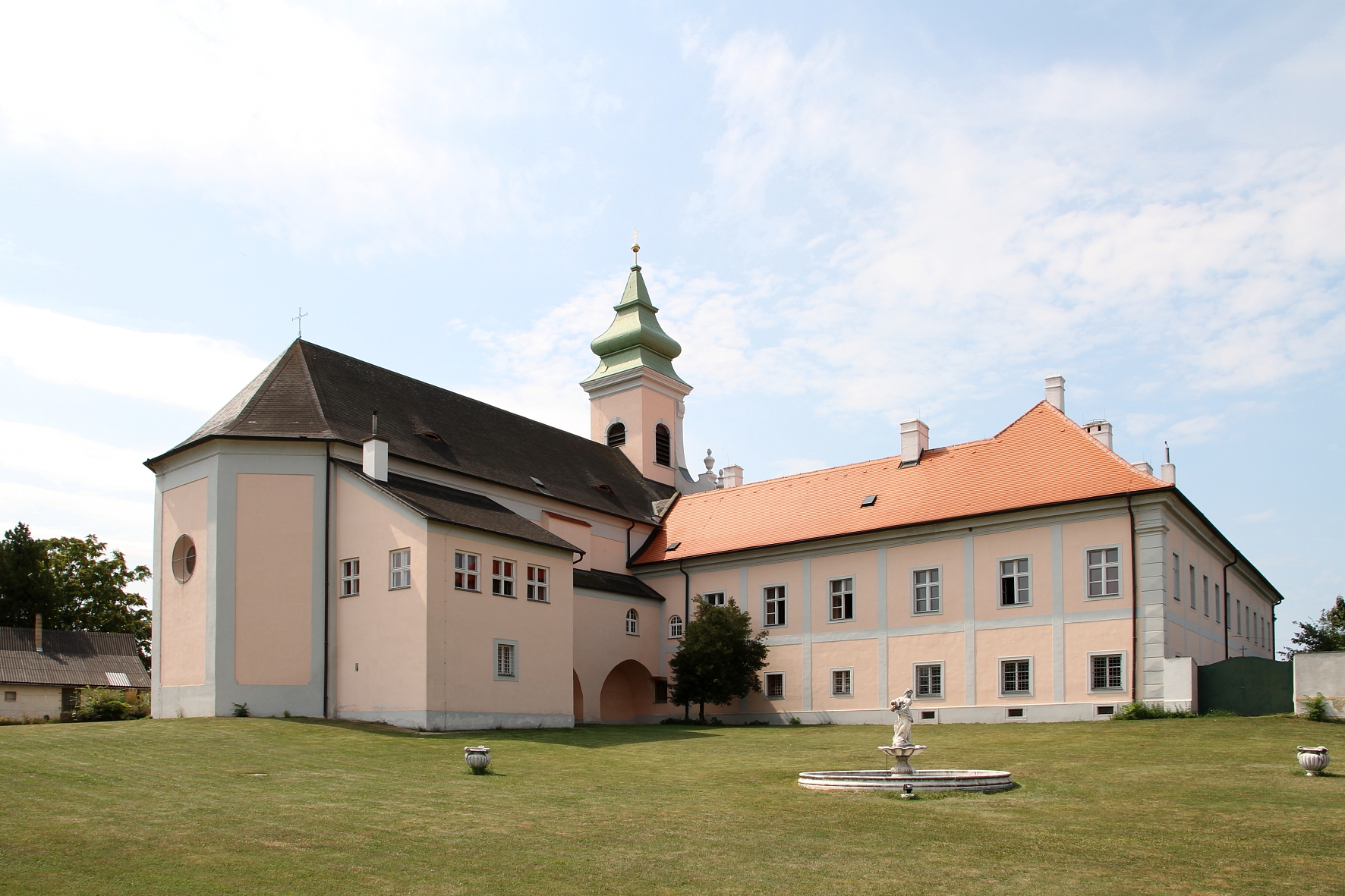 Das ehemalige Kloster in der burgenländischen Gemeinde Mönchhof.